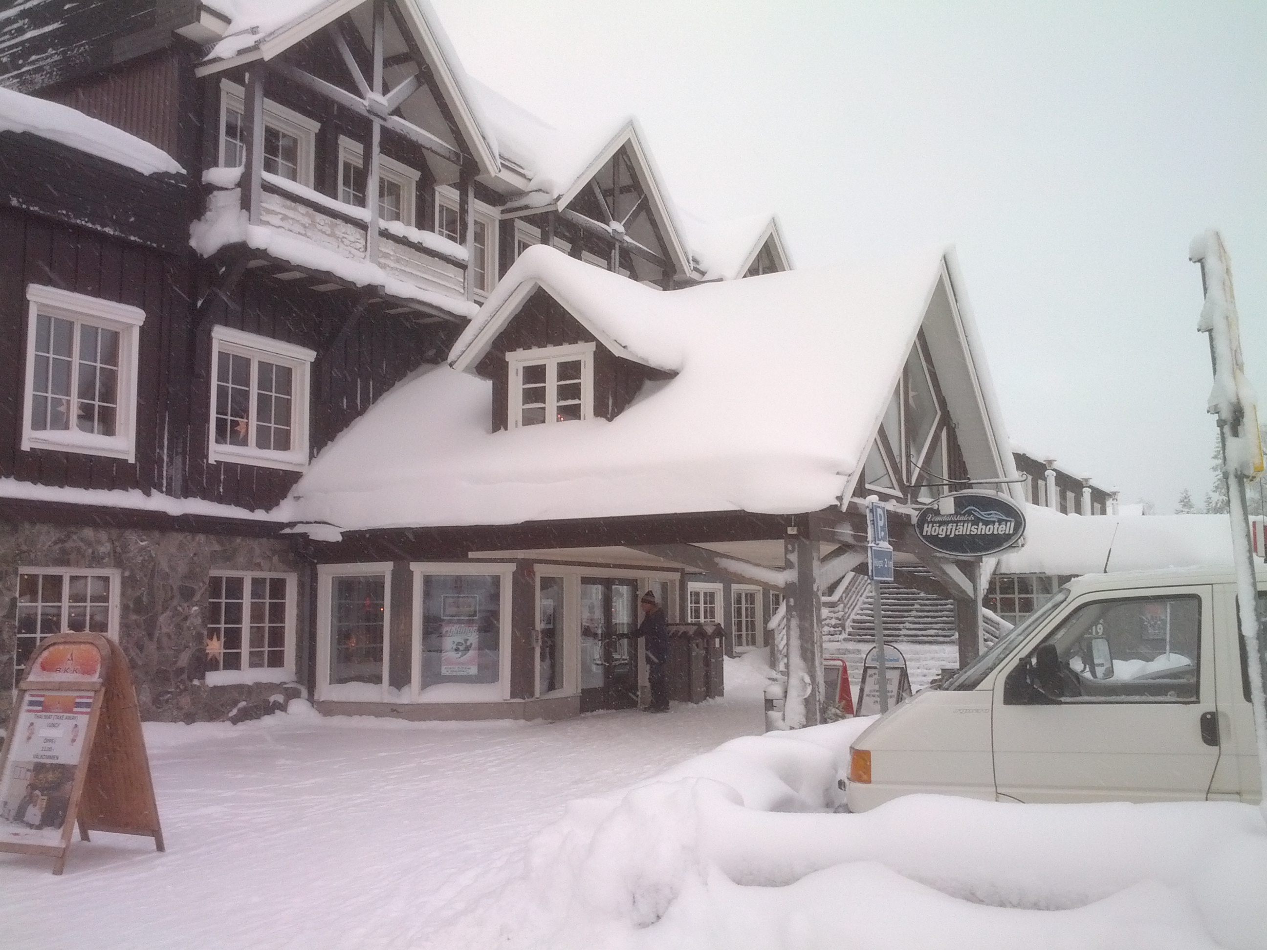 Hotell i Vemdalsskalet.